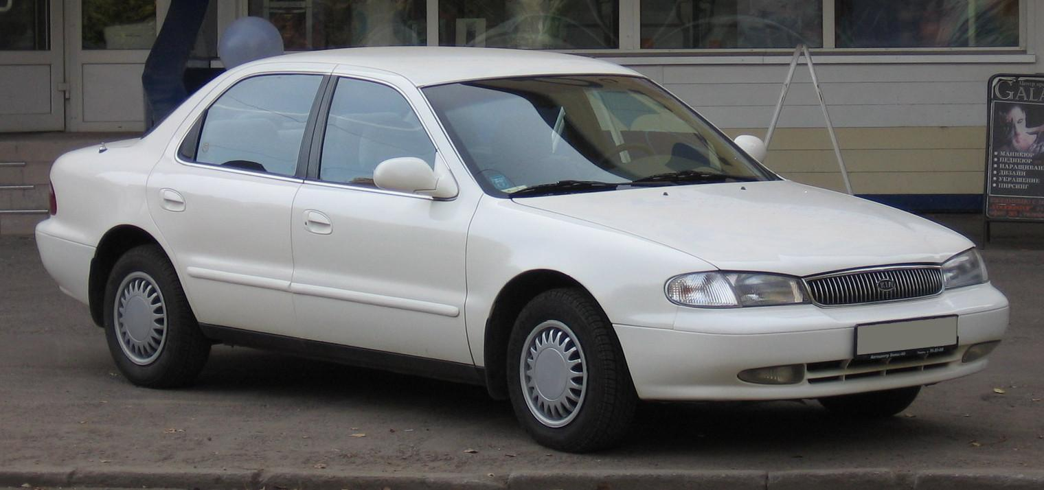 Photo taken in Tomsk, Russia